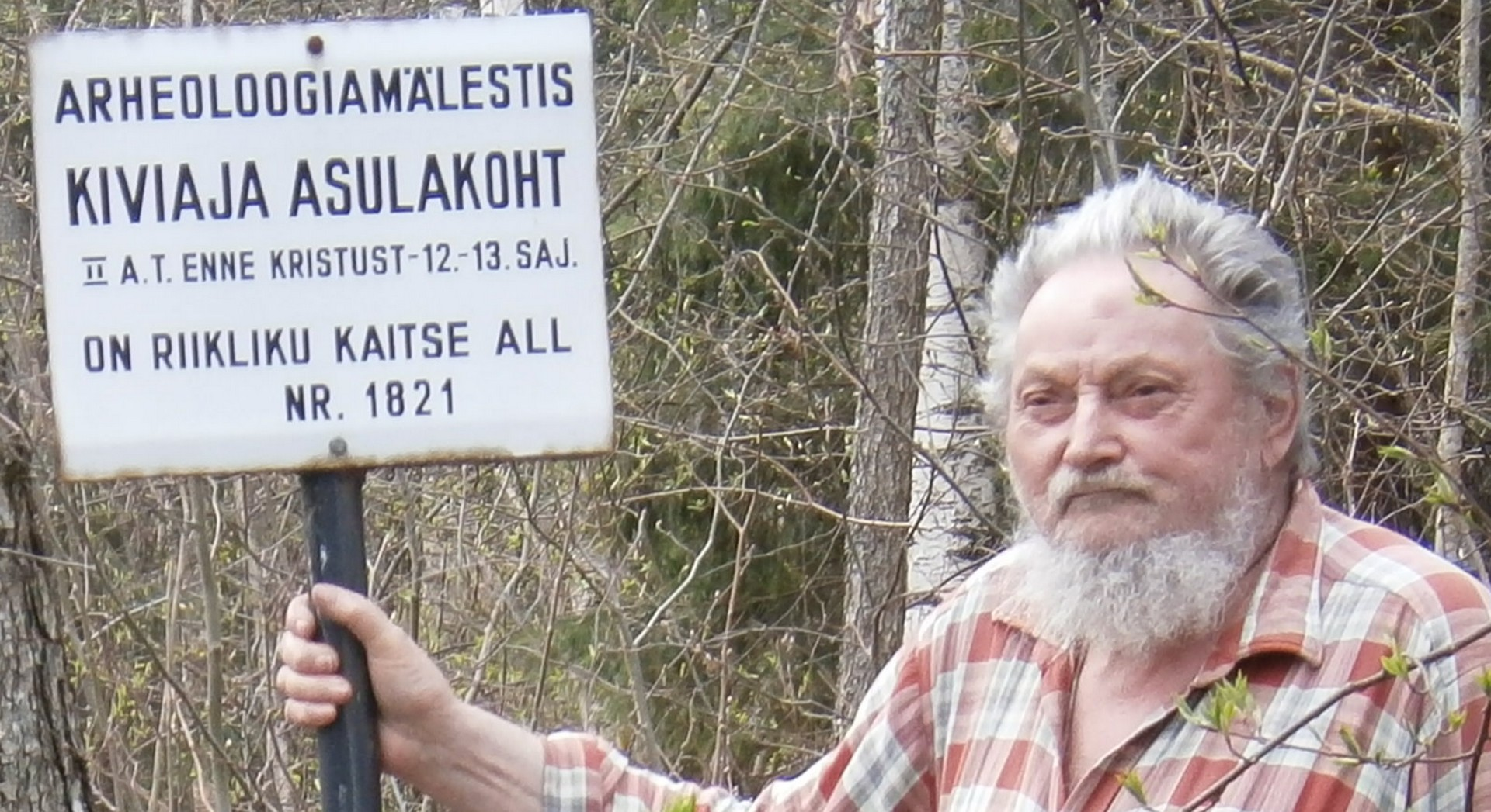 Viljandimaa, Viiratsi vald, Valma küla. Saba kärga all koos Saba talu peremehega